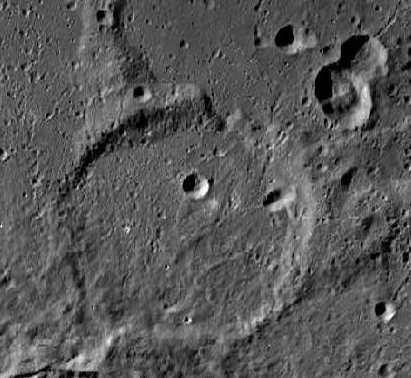 Cráter lunar Segner. (Imagen LRO)